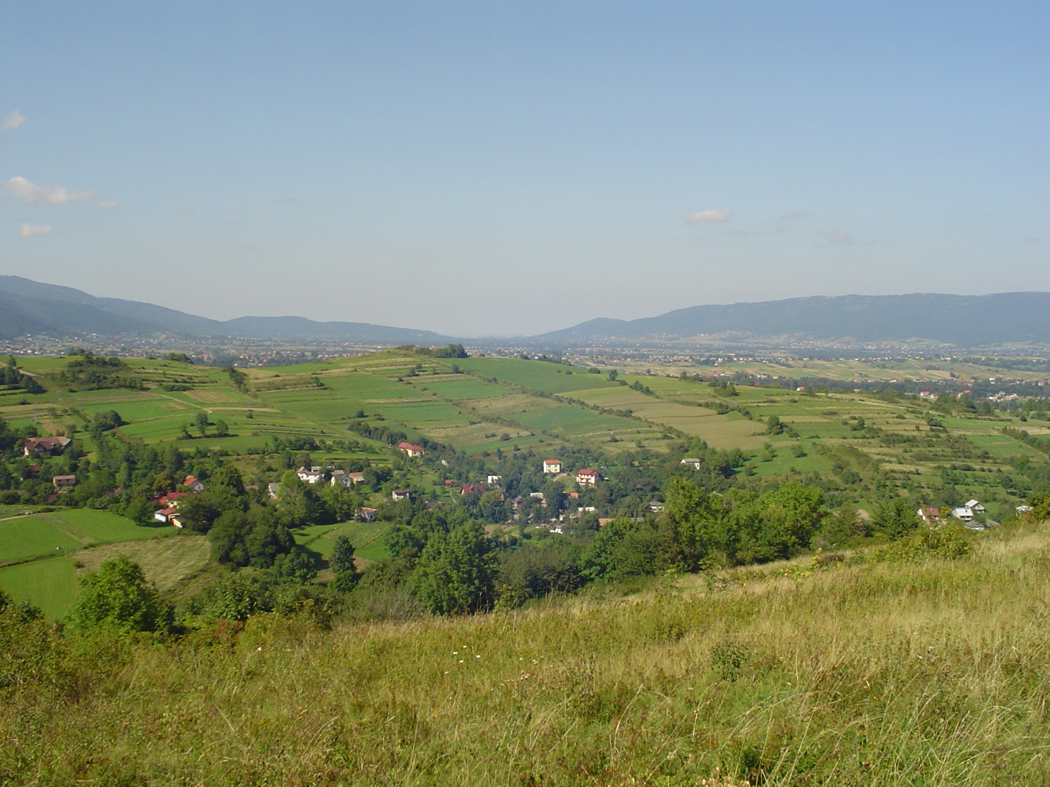 Radziechowy widziane z Matyski (górna część miejscowości), w tle widoczne wzniesienie Kopa Radziechowska; dalej w dolinie Bielsko-Biała (osiedle Złote Łany)